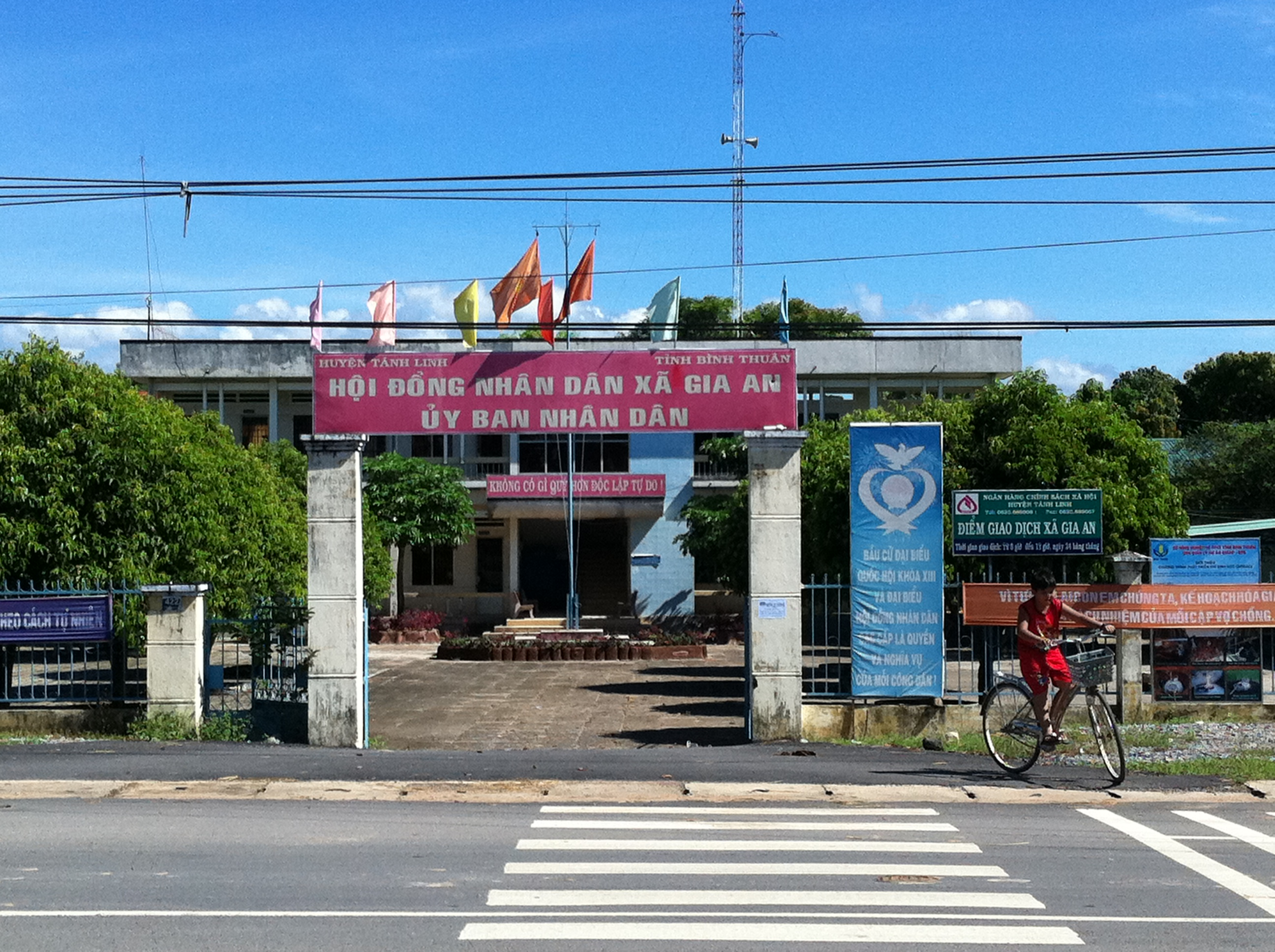 UBND xã Gia An